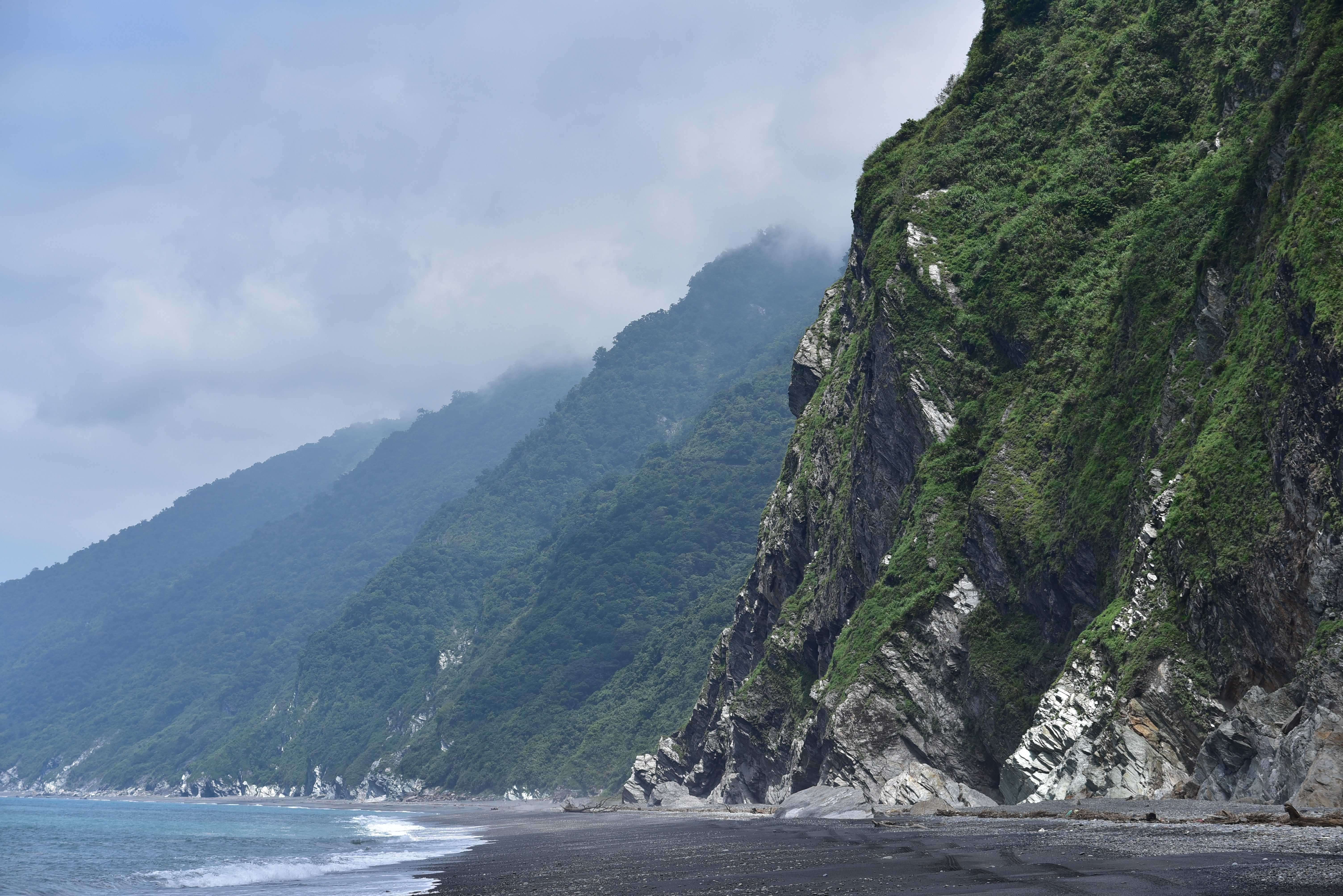 觀音海岸野生動物重要棲息環境2017